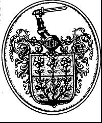 sverdrup crest